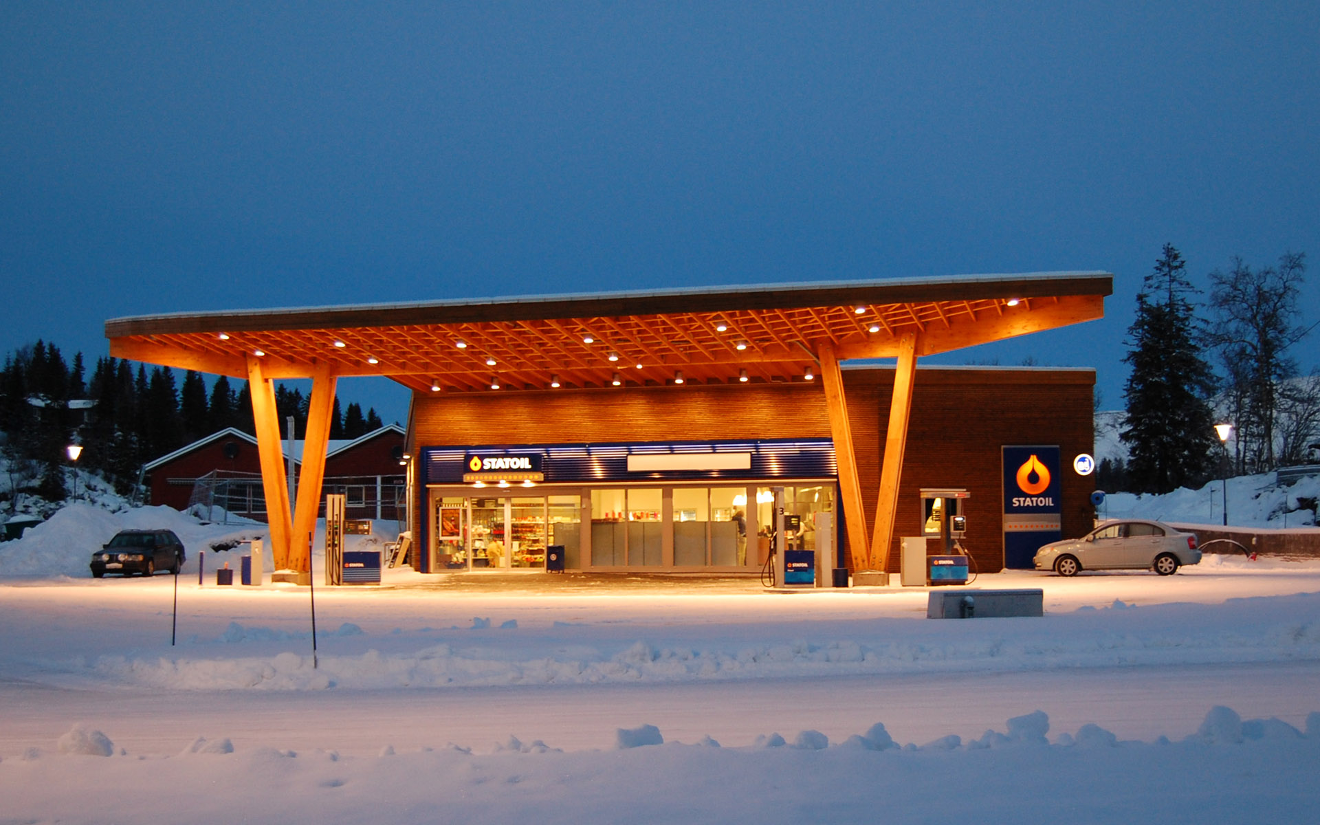 Statoil-stasjonen i Velfjord, Brønnøy kommune i Nordland.